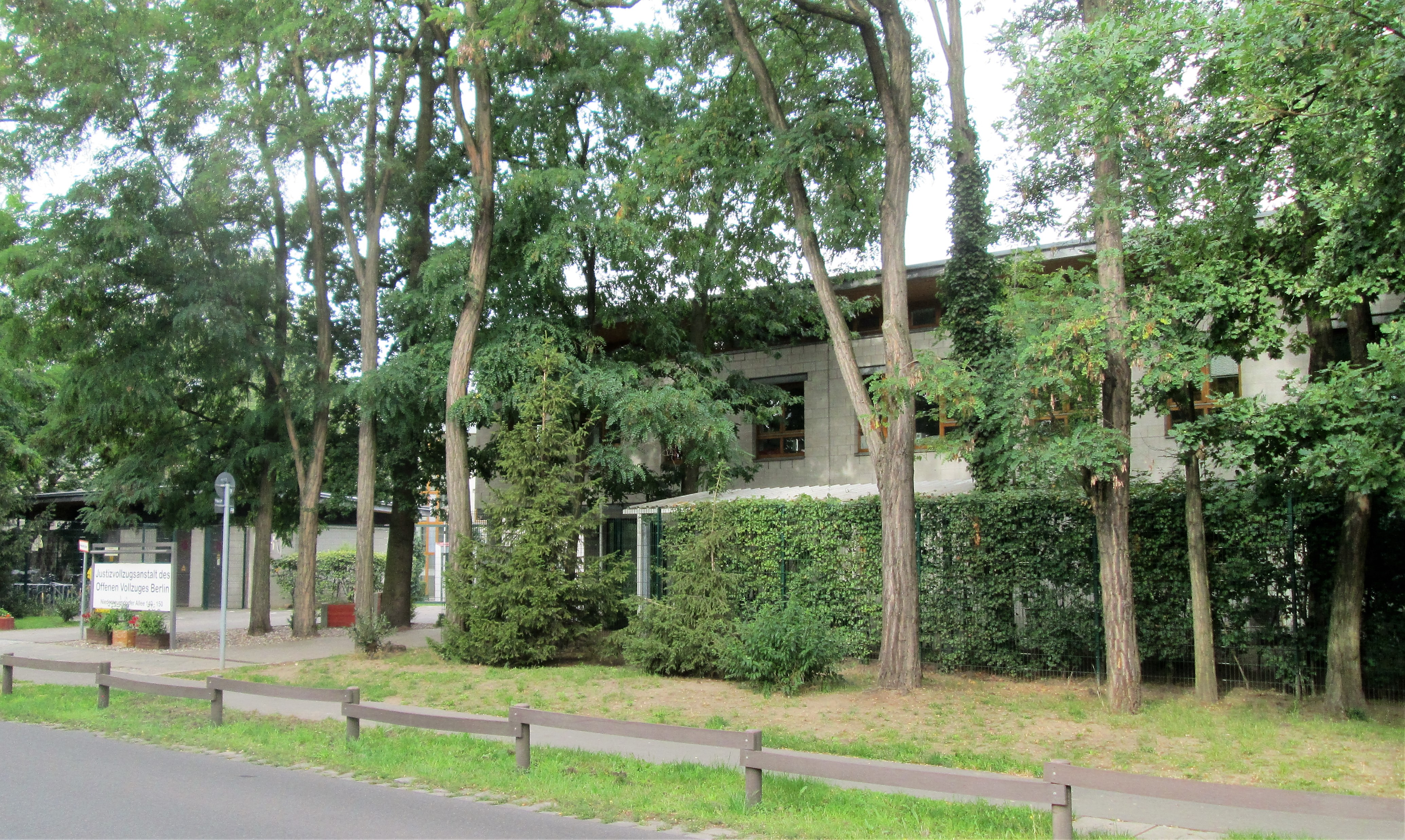 Justizvollzugsanstalt Berlin-Hakenfelde, Blick von Niederneuendorfer Allee